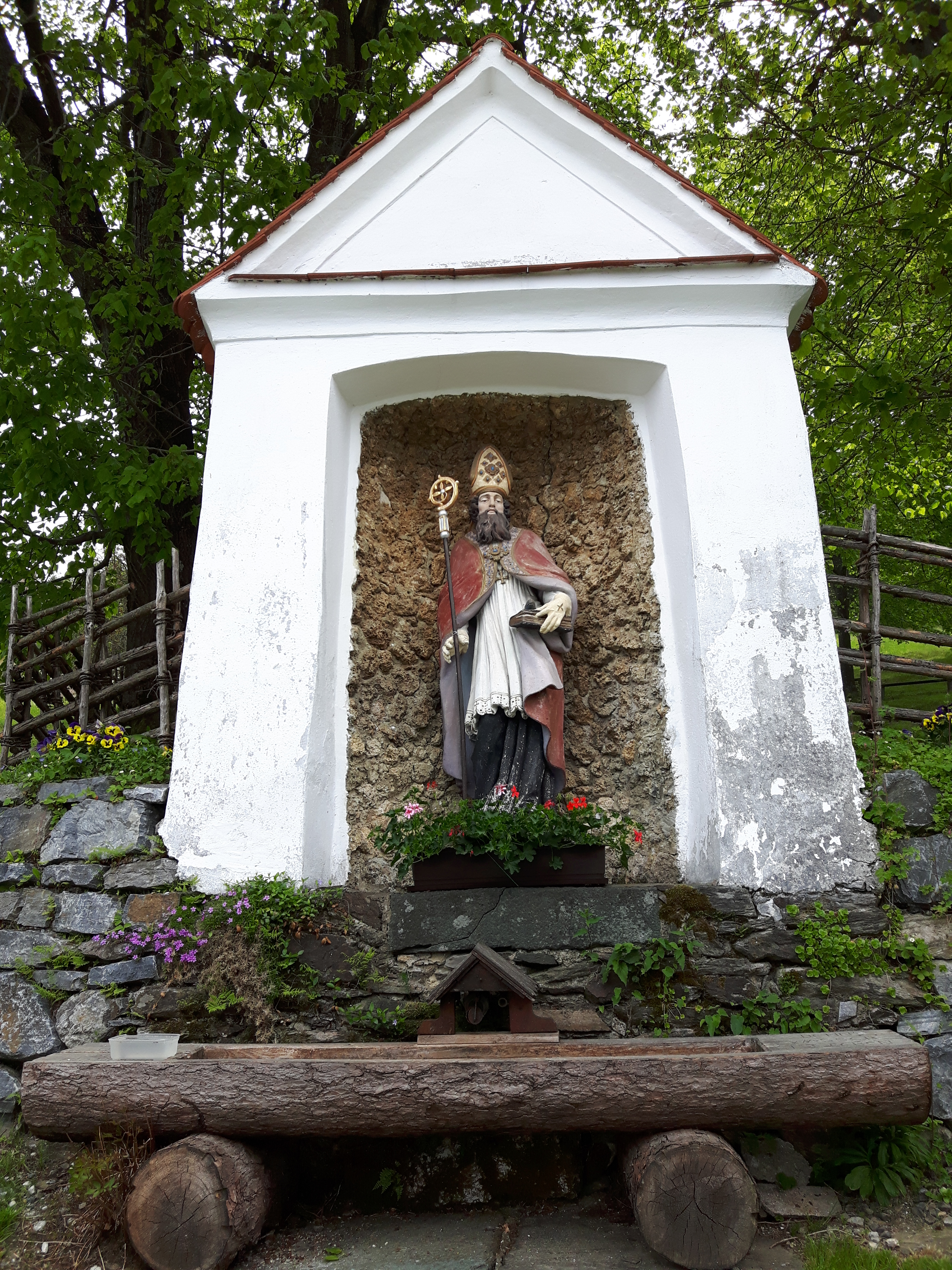 Sog. Ulrichsbrunn